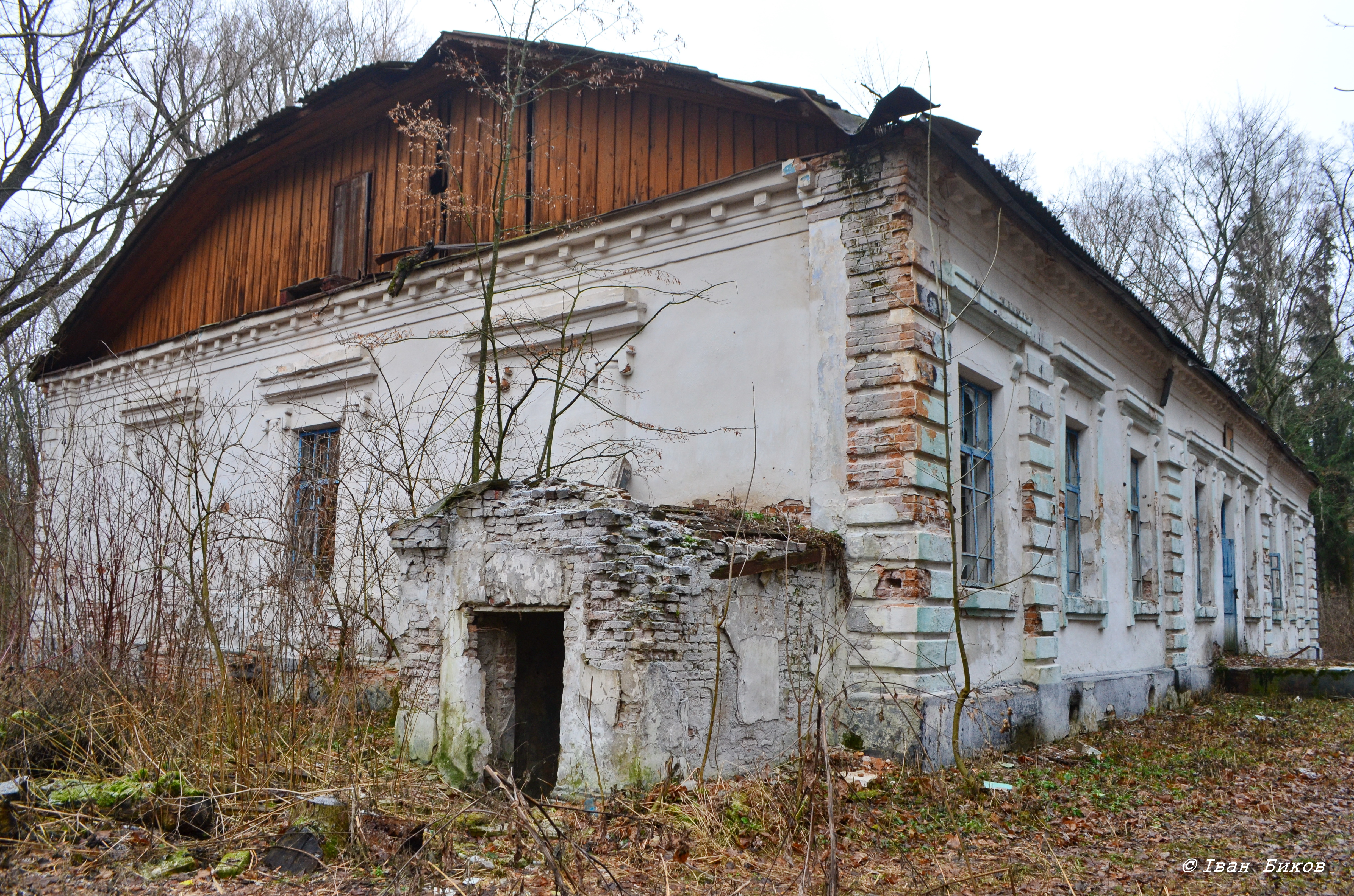 Будинок Кочубея (мур.), Тиниця, вул.Матросова, 3